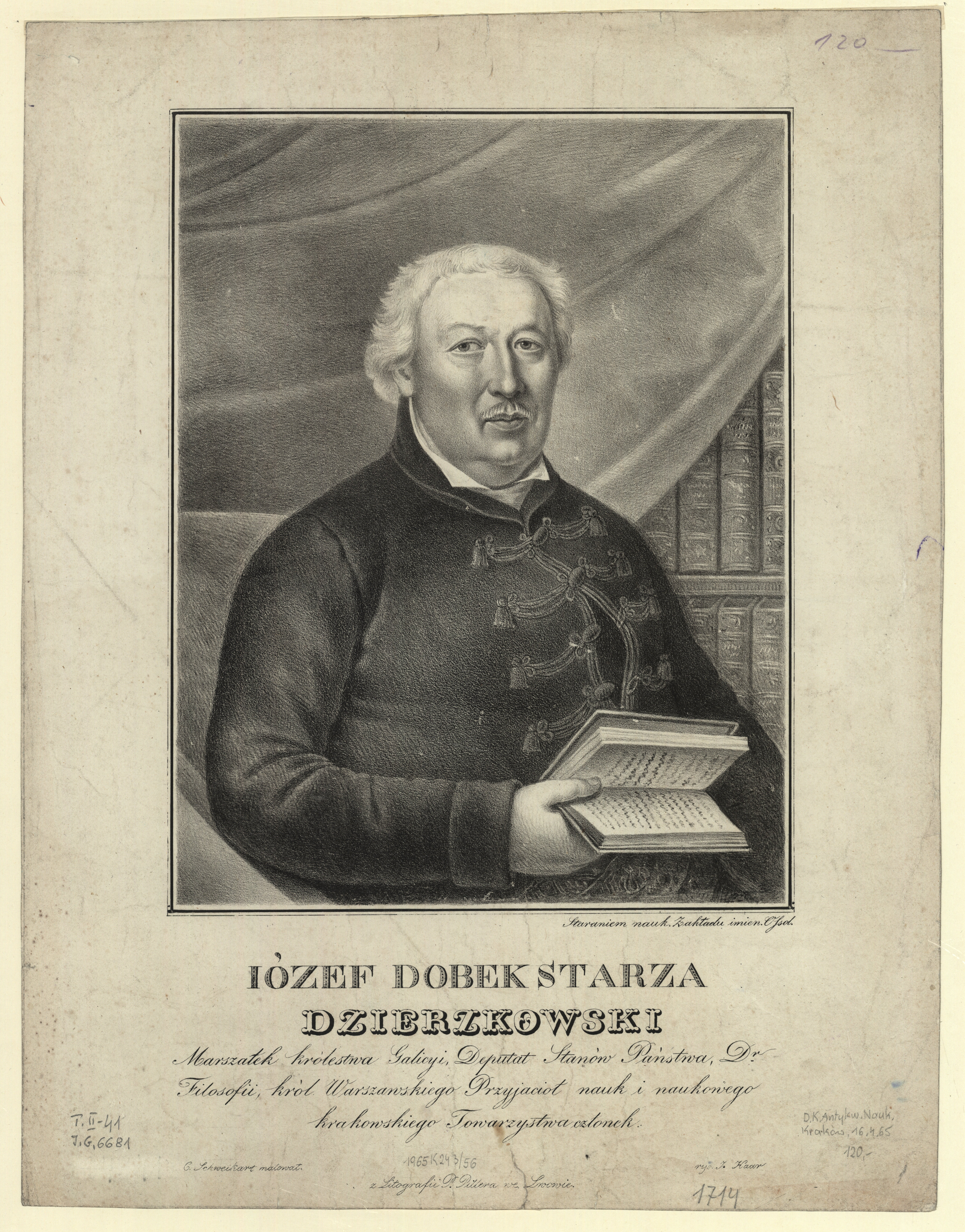 Józef Dobek Dzierzkowski